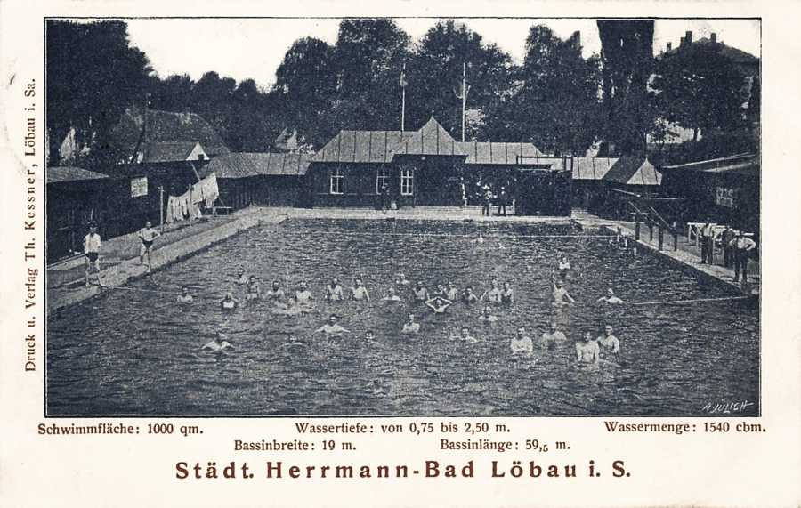 Städt. Herrmann-Bad Löbau i.S.; Ansichtskarte aus dem Jahr 1910